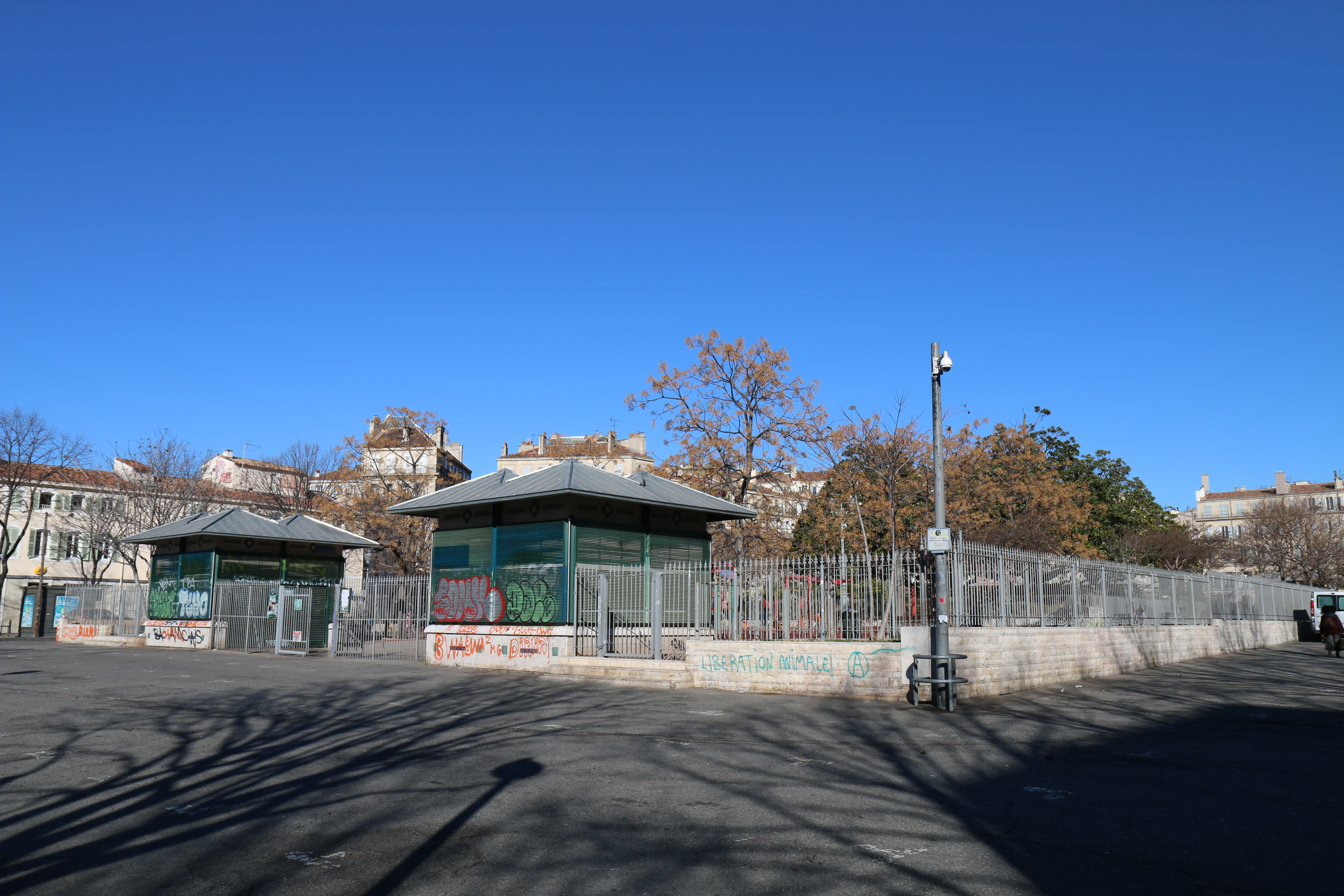 Place Jean-Jaurès à Marseille, appelée localement "La plaine".